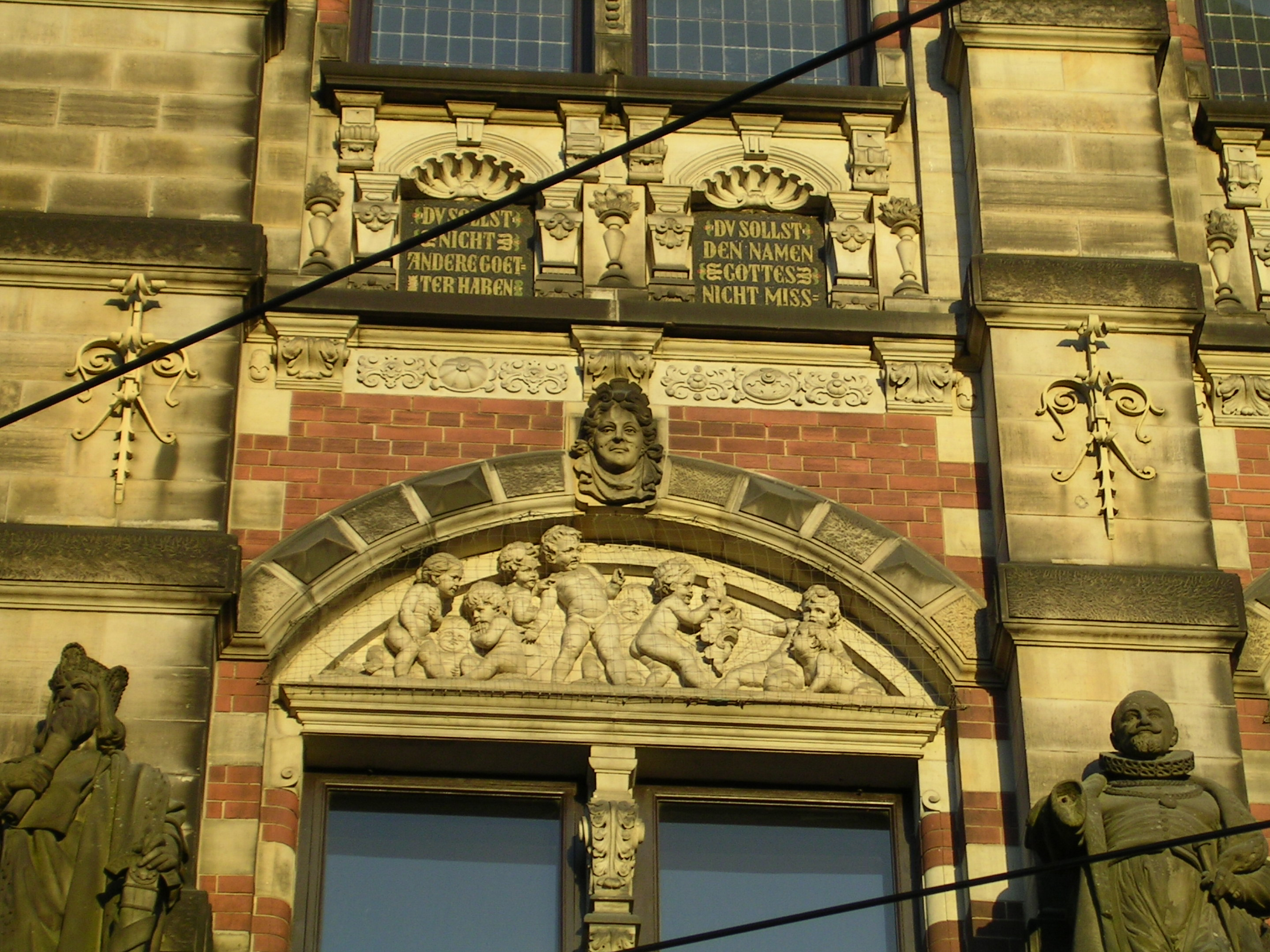 Information Plate on Gerichtsgebaeude Bremen, Germany